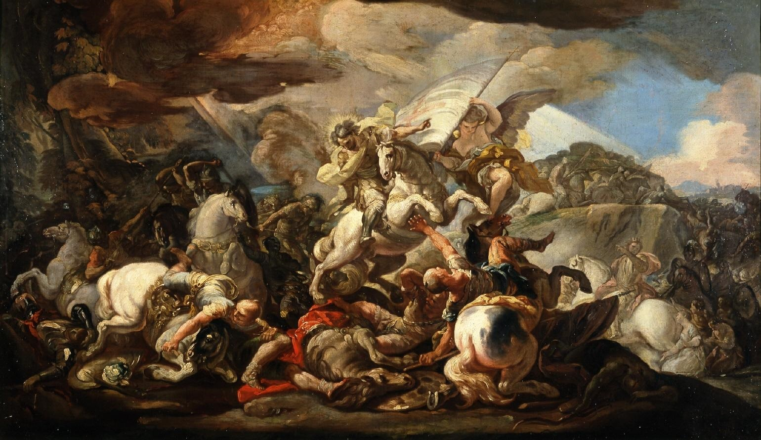 La obra representa al apóstol Santiago el Mayor combatiendo a favor de los cristianos en la legendaria batalla de Clavijo.